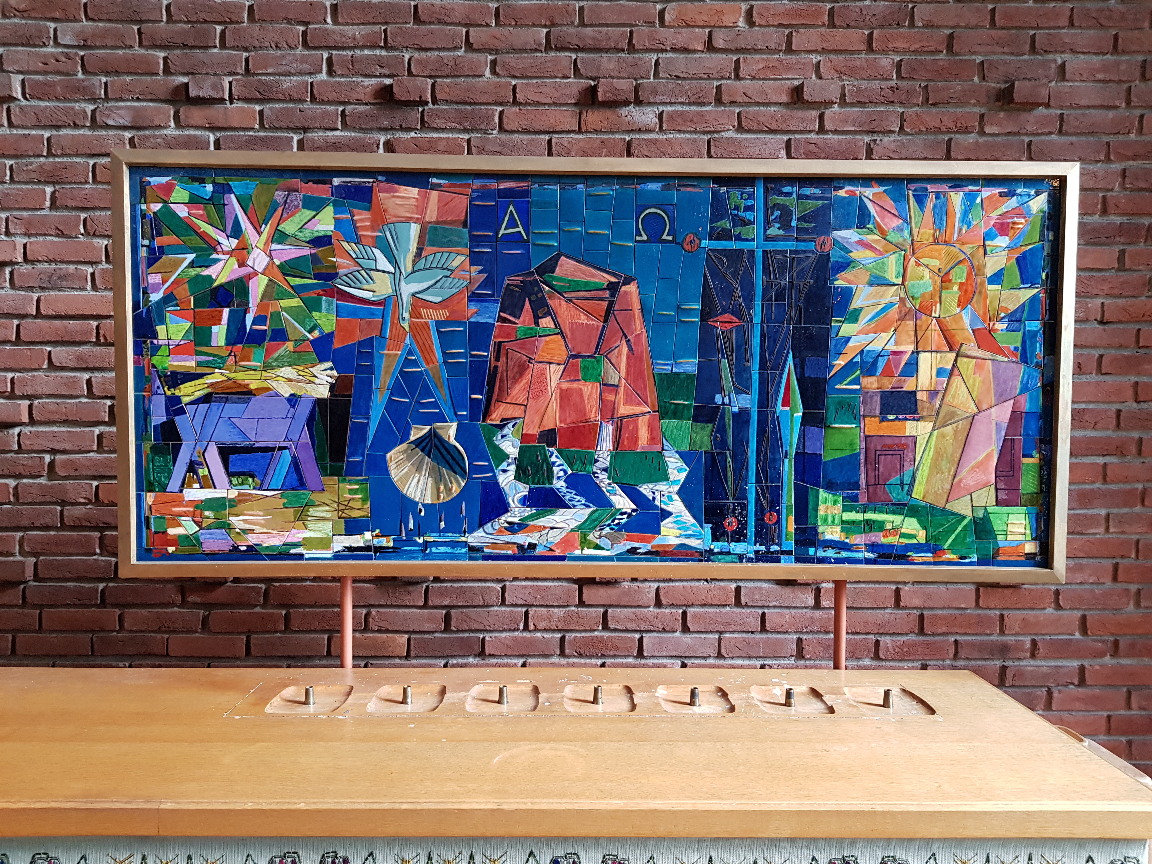 Arne E. Holms altertavle i Herøya kirke, ferdig 1958. Kirken ble vigslet i 1957. Det første året var ikke altertavlen ferdig, så over alteret hang et maleri av altertavlen slik den skulle bli. Stiftene på bordet i forgrunnen er fester for alterlys, som er fjernet pga fotograferingen.